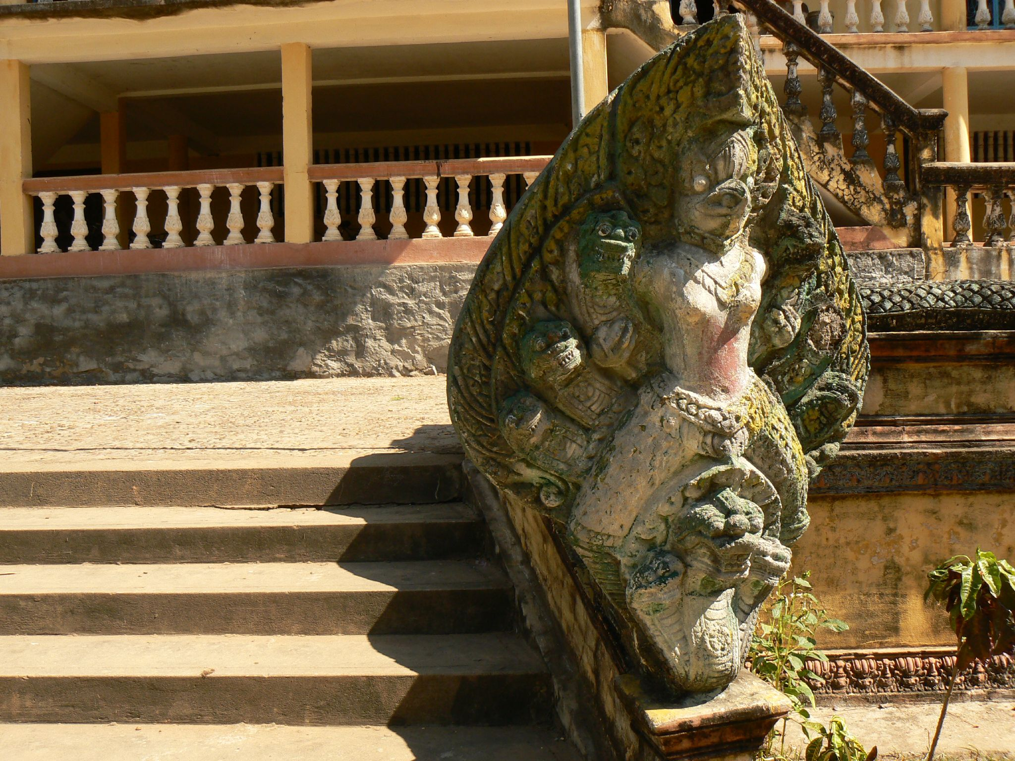 100 pillar pagoda, Kratie, Cambodia.